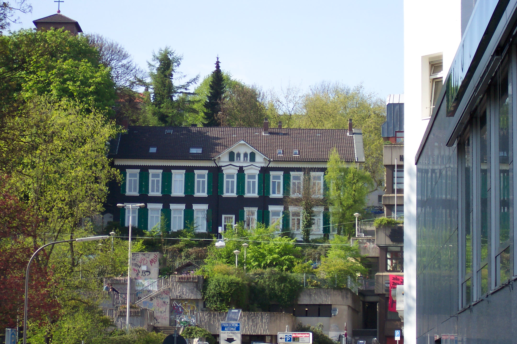 Wuppertal Elberfeld